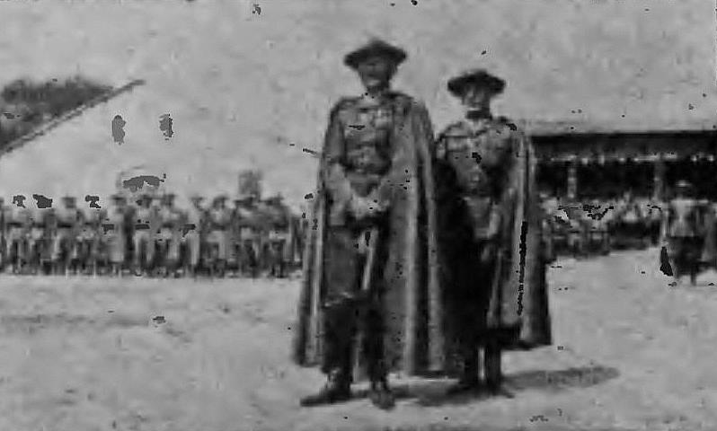 ppłk Czesław Kopański (49 Huculski Pułk Strzelców, 1938)